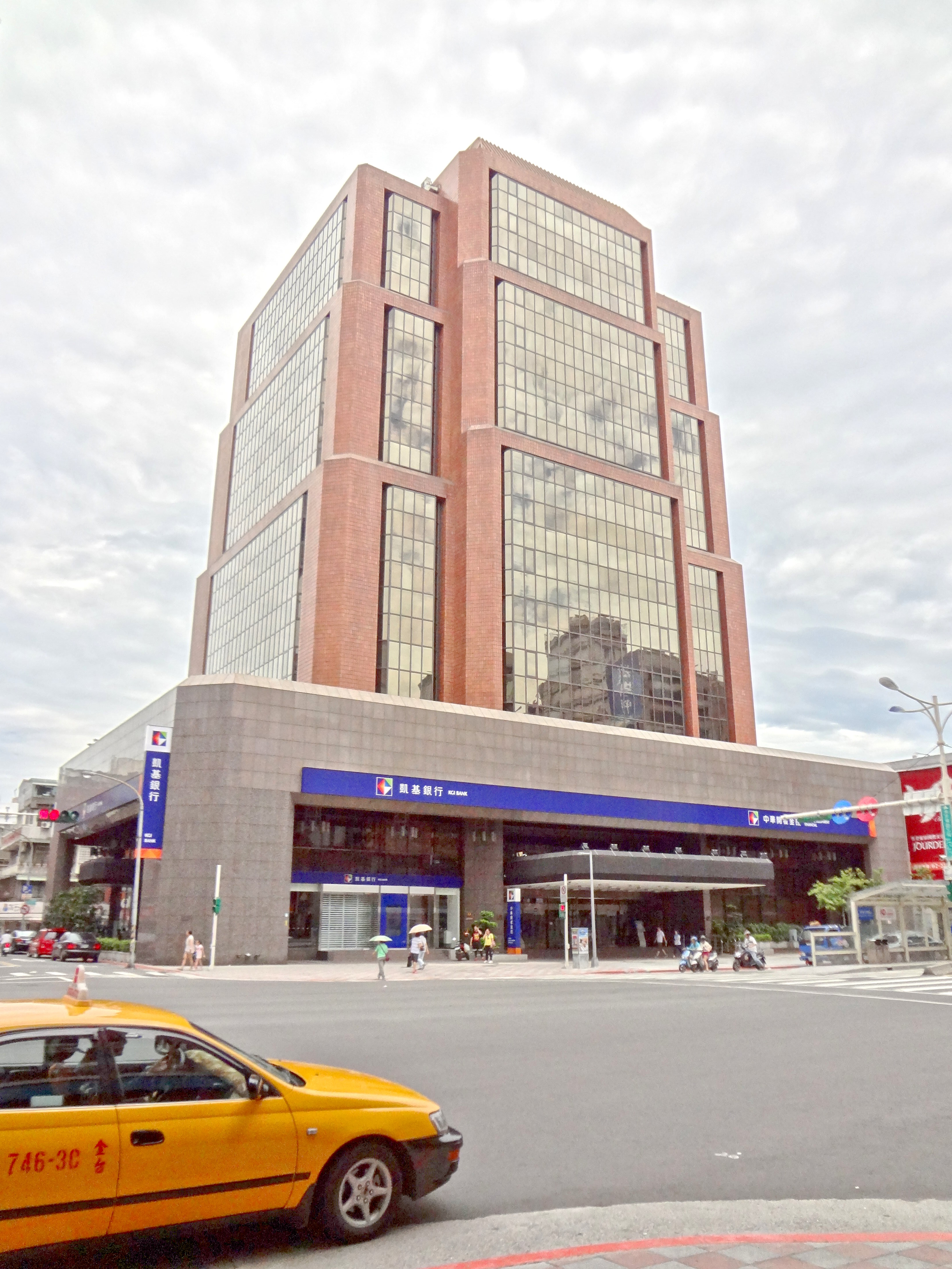 中華開發金融控股公司總部大樓。